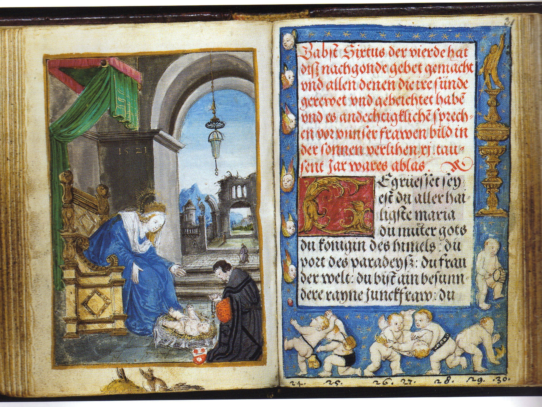 Berlin, Staatl. Museen - Kupferstichkabinett, Cod. 78 B 10, Bl. 30-31v Anbetung Marias und des Kindes durch Matthäus Schwarz zu Augsburg